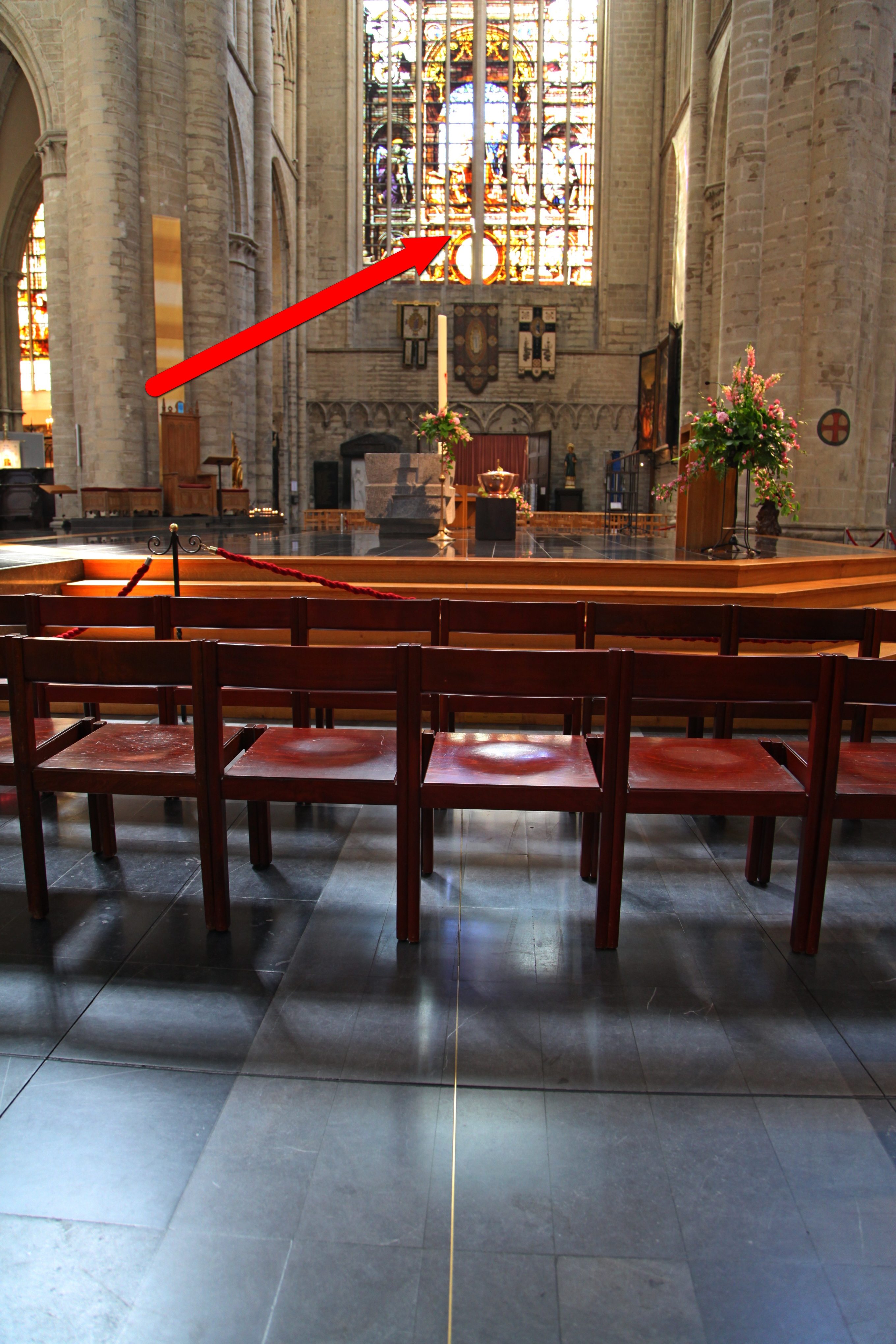 Au sol,la ligne cuivrée représentant le tracé du méridien;sur le vitrail du fond on remarque l'oculus percé permettant aux rayons du soleil de marquer la ligne sur le sol.